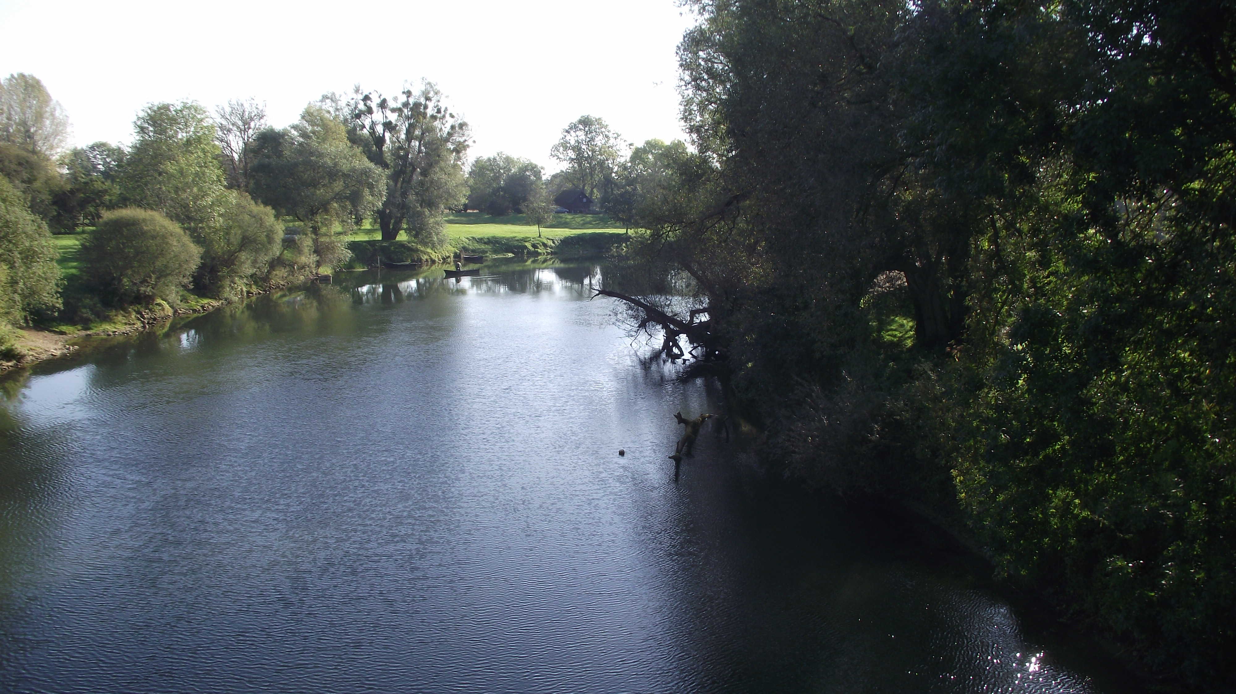 De Maas vlakbij Bazeilles. Dit gedeelte is niet bevaarbaar.